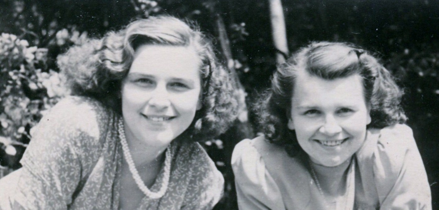 2 Schwestern 1947 mit fröhlichen Lockenfrisuren